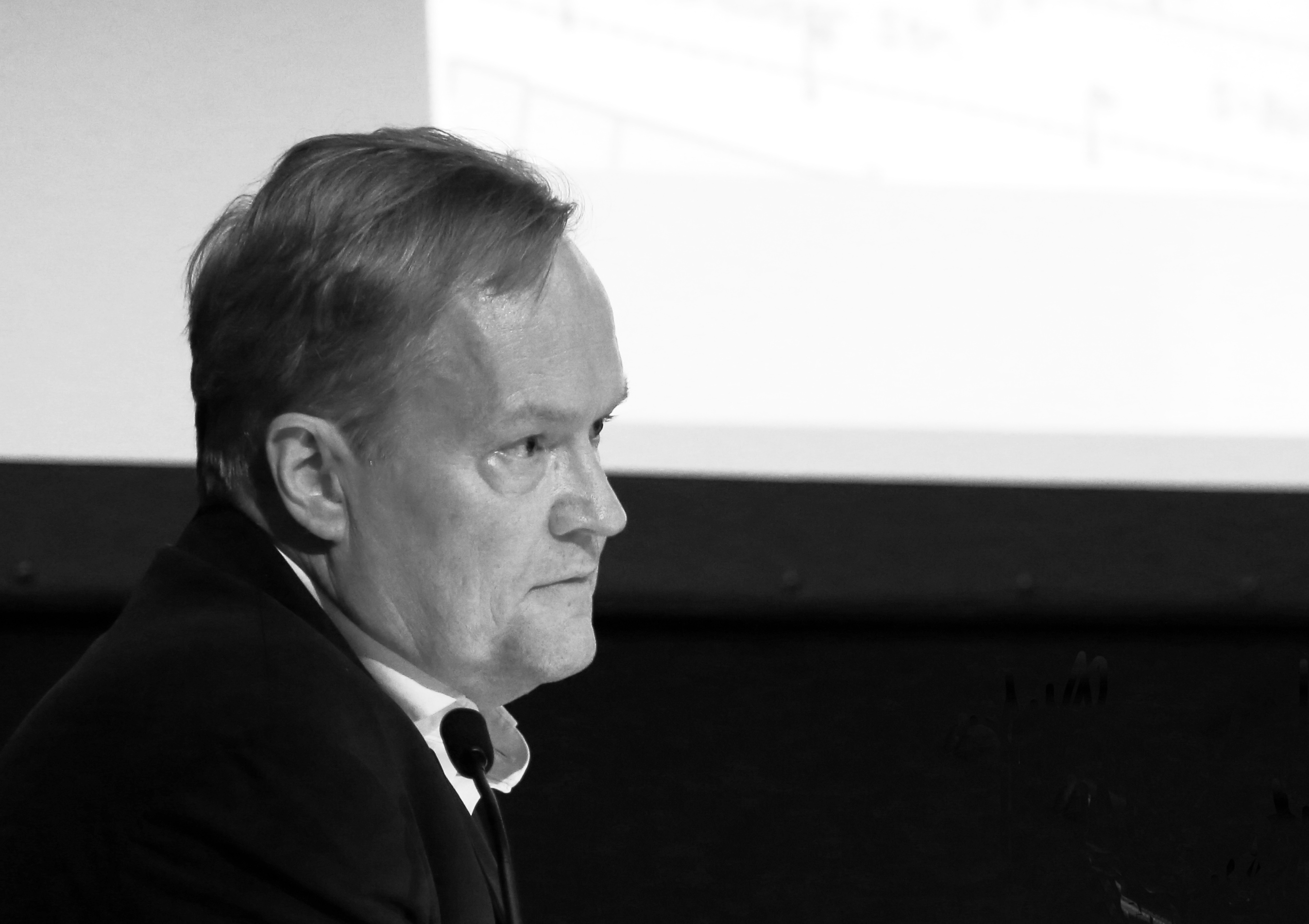 Mathias Pfeil, Landeskonservator des Bayerischen Landesamts für Denkmalpflege